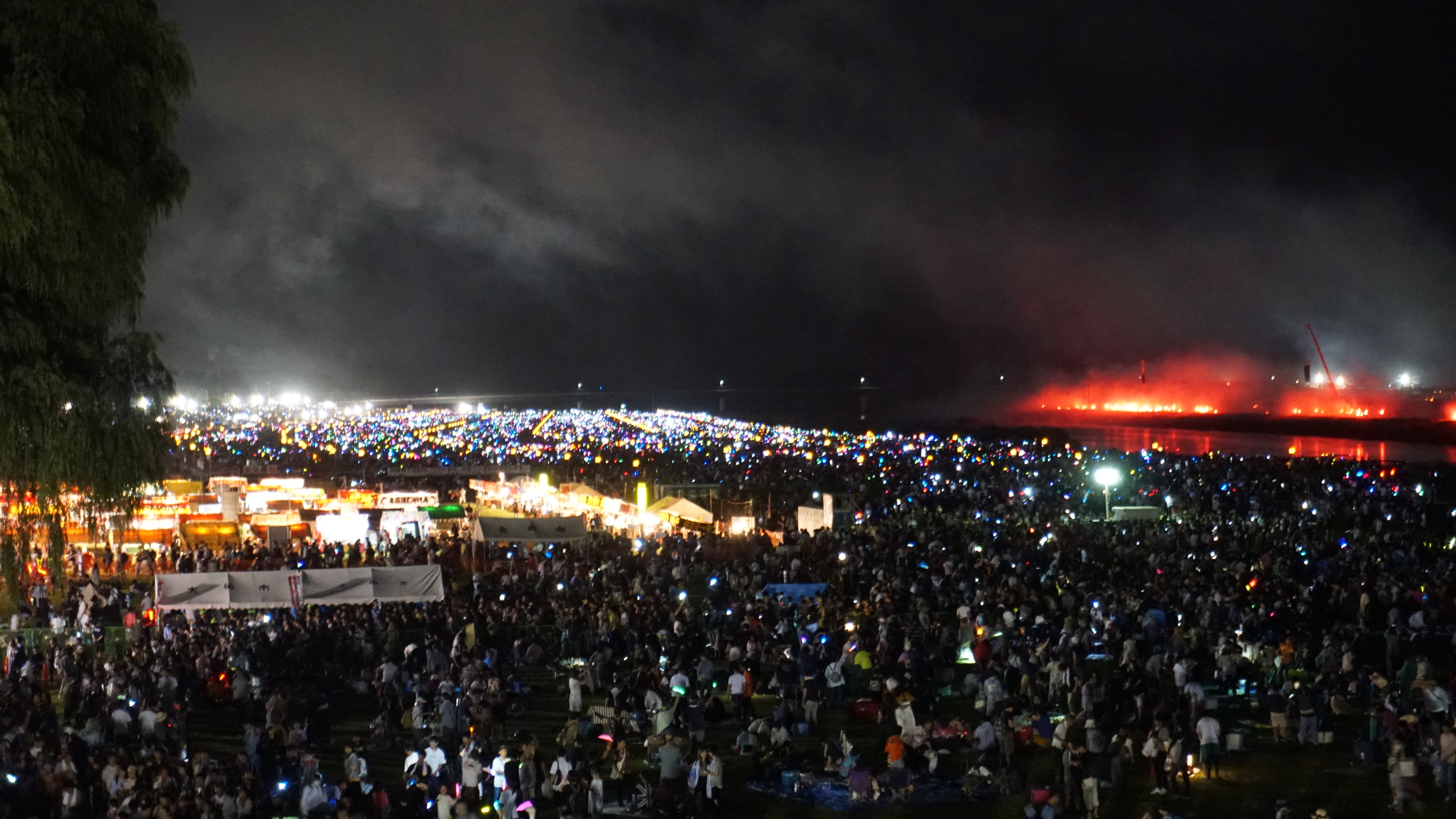 秋田県大仙市で毎年8月下旬に行われる全国花火競技大会（通称「大曲の花火」）のフィナーレの様子。エンディングテーマ曲の南こうせつ『満天の星』を背景に、観客席から雄物川対岸の花火師達に向けてライトを振って感謝の気持ちを伝え、花火師はトーチを振ってそれに応える「エールの交換」が行われる。 Sony ILCE-6300